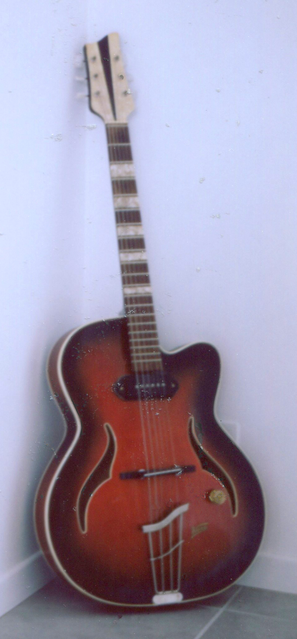 Klira archtop electric guitar Polaroid 350 Fuji FP-100C